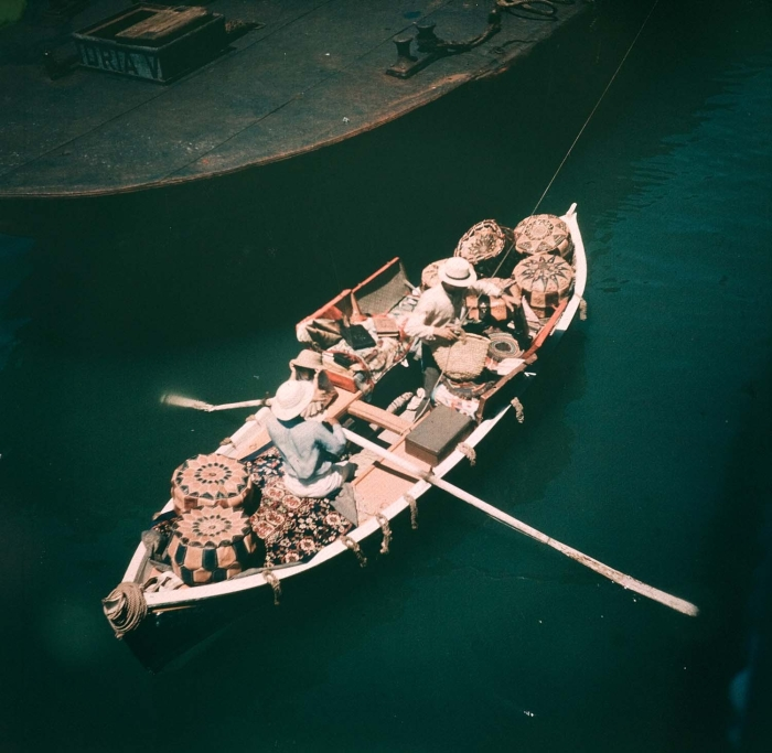 Het passagiersschip ms. Dempo van de Rotterdamsche Lloyd is op weg van Nederland naar Nederlands-Indië.